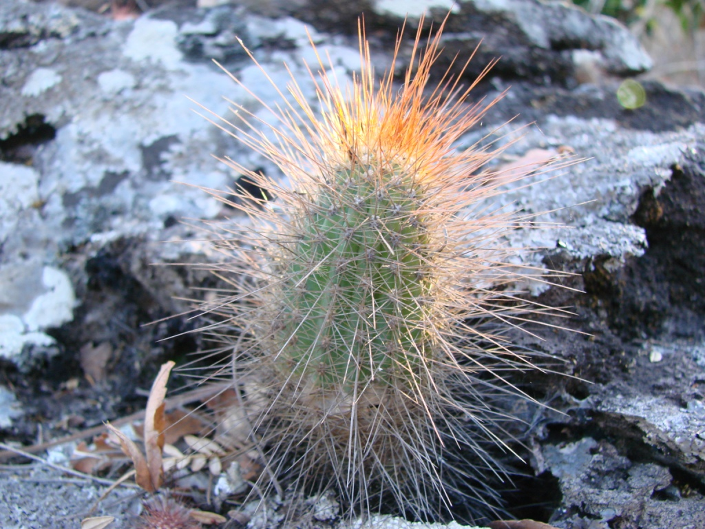 Micranthocereus estevesii - CACTACEAE Parque Estadual Terra Ronca - São Domingos - Goiás - Brasil